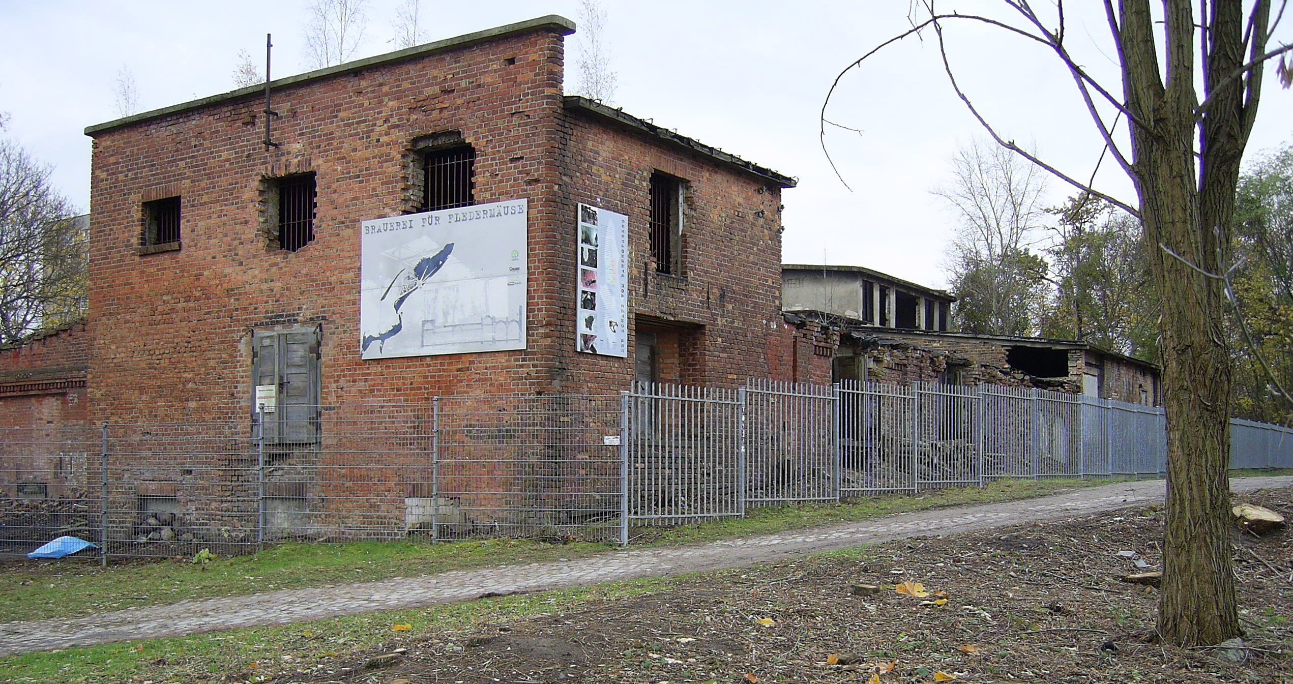 Die ehemalige Brauerei in Frankfurt (Oder), heute als Winterquartier für Fledermäuse unter Naturschutz stehend.